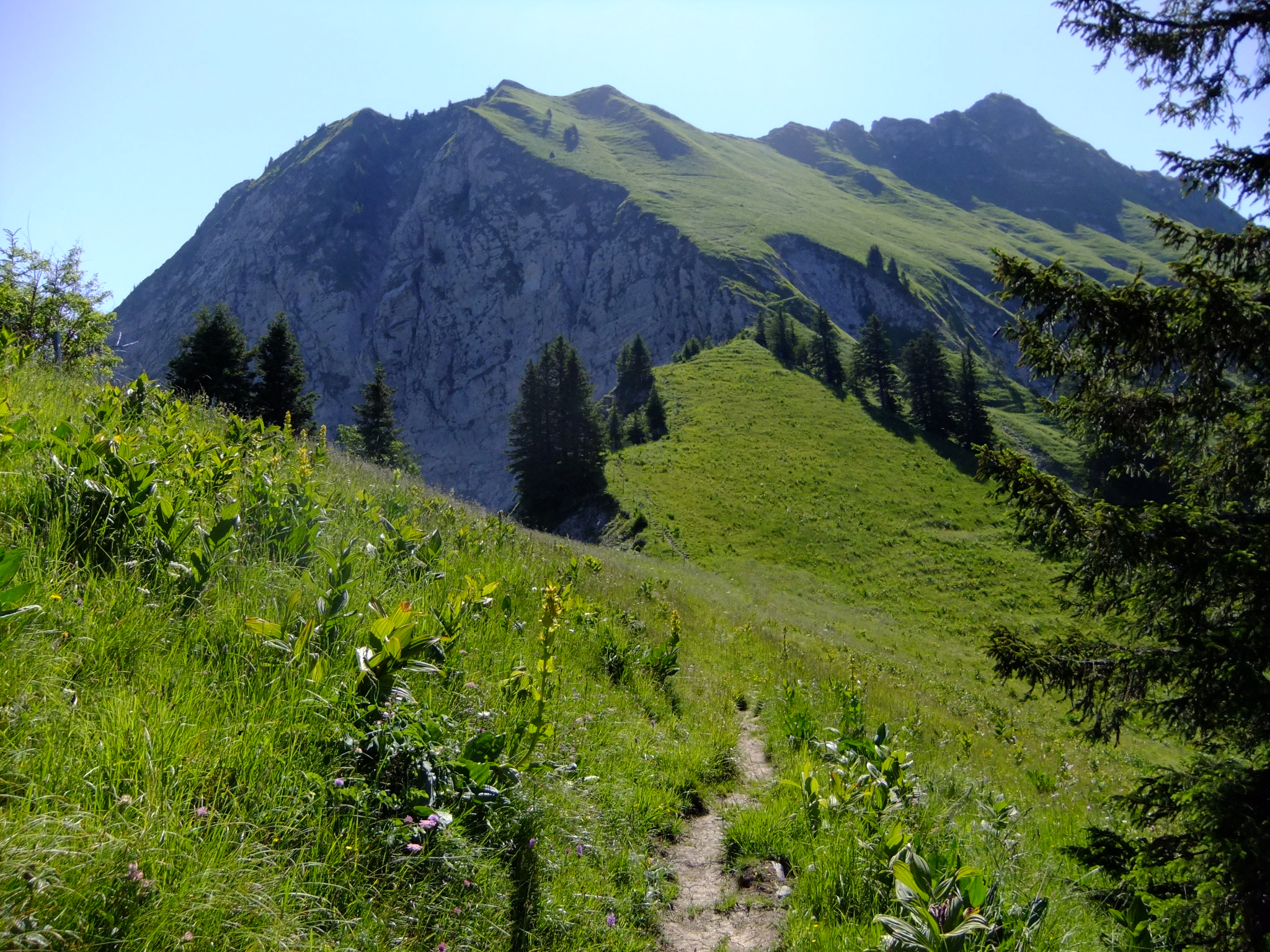 La Cape au Moine vue depuis le nord-ouest (la photographie est prise à proximité du col de Soladier)